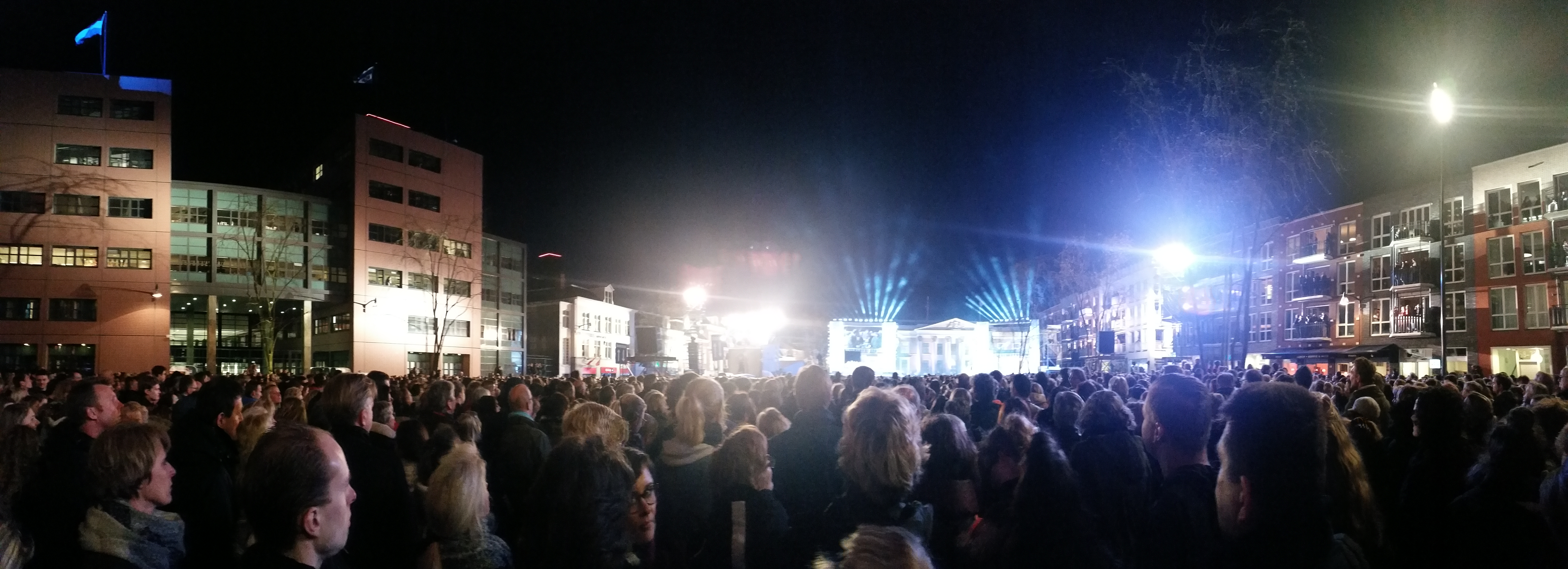 The Passion 2017 op het Wilhelminaplein, Leeuwarden